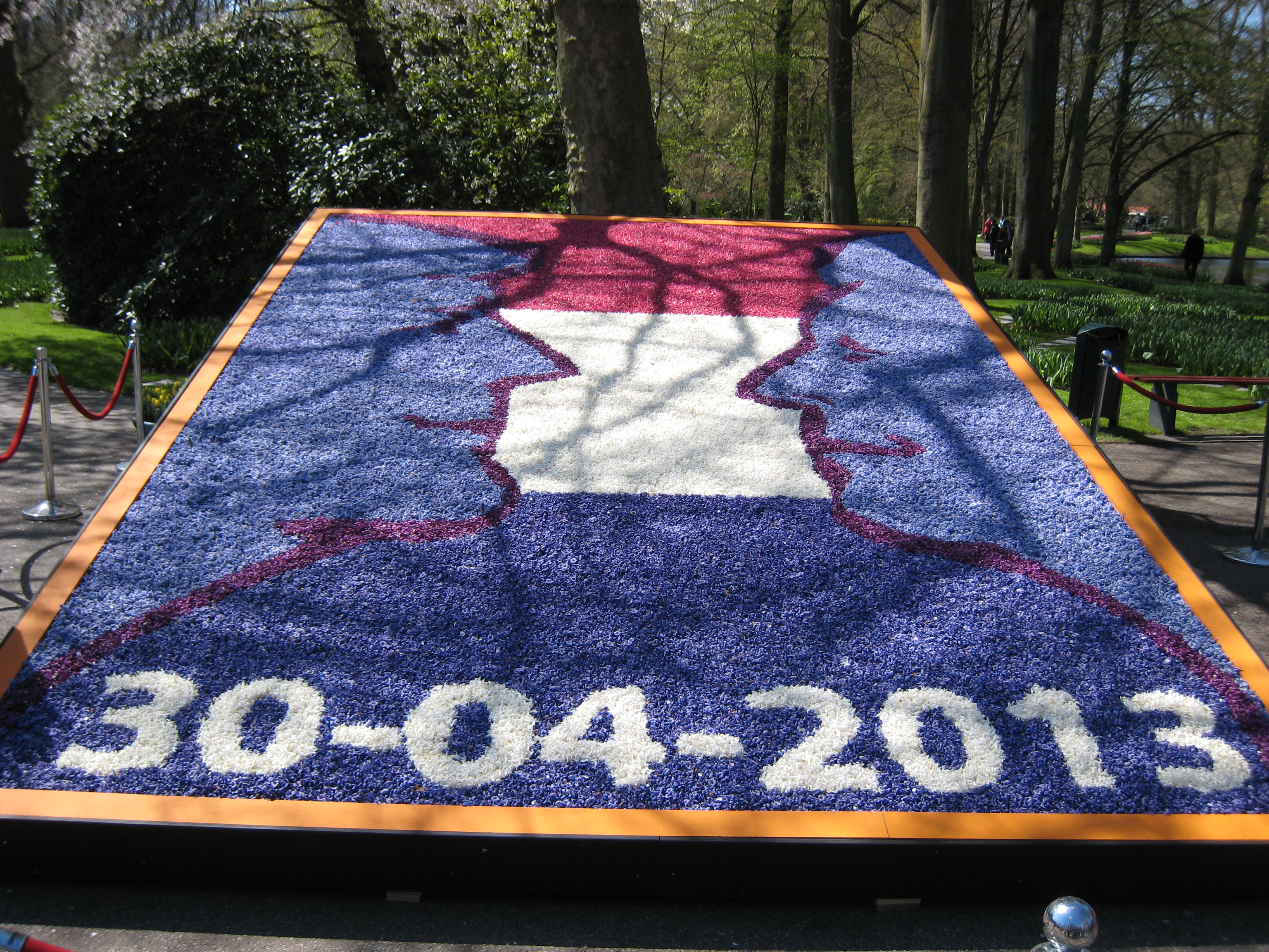 Tableau floral à Keukenhof pour l'investiture de Willem-Alexander.